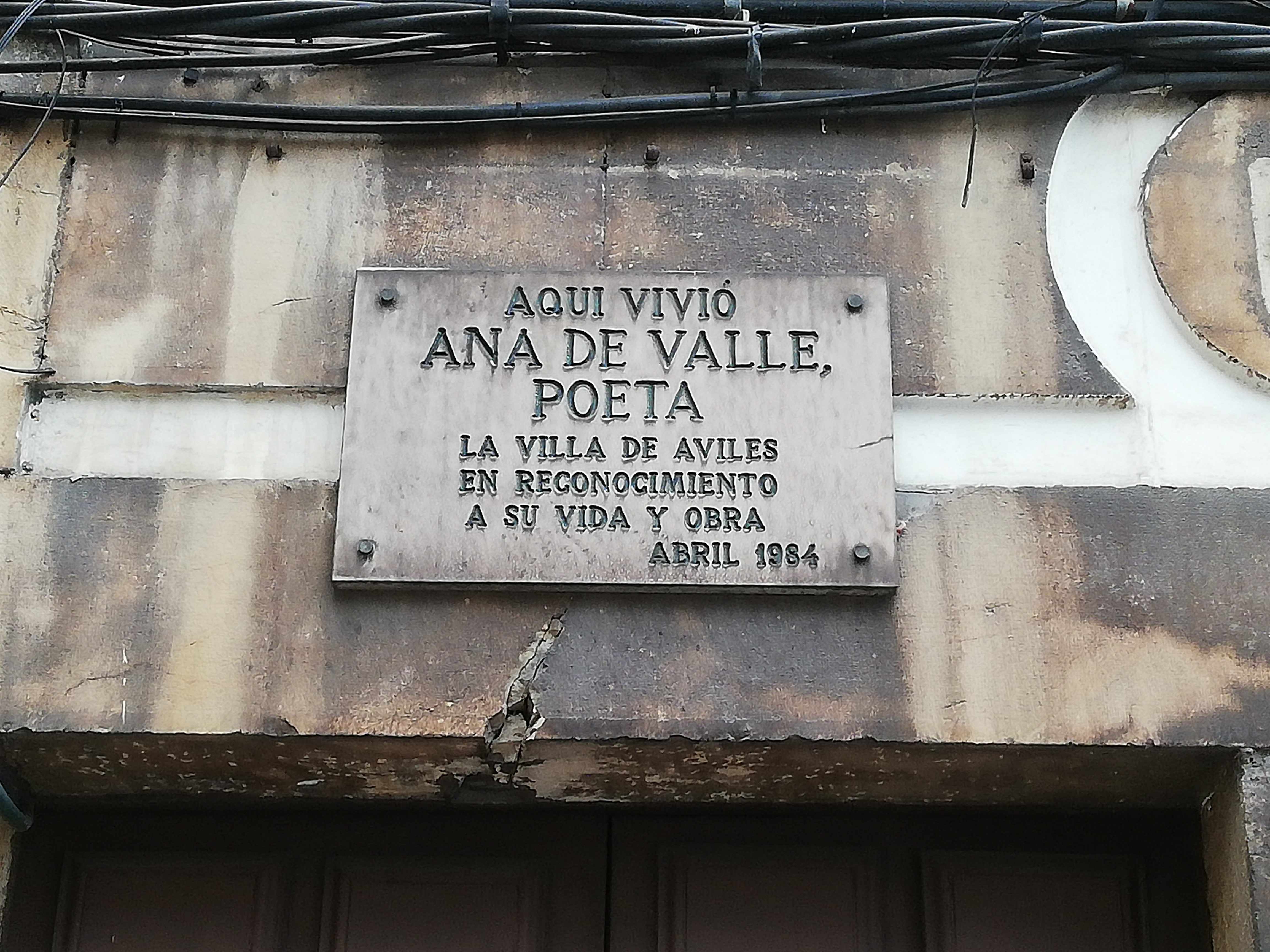 Placa conmemorativa en la fachada de la vivienda donde residió la poeta Ana de Valle, Avilés